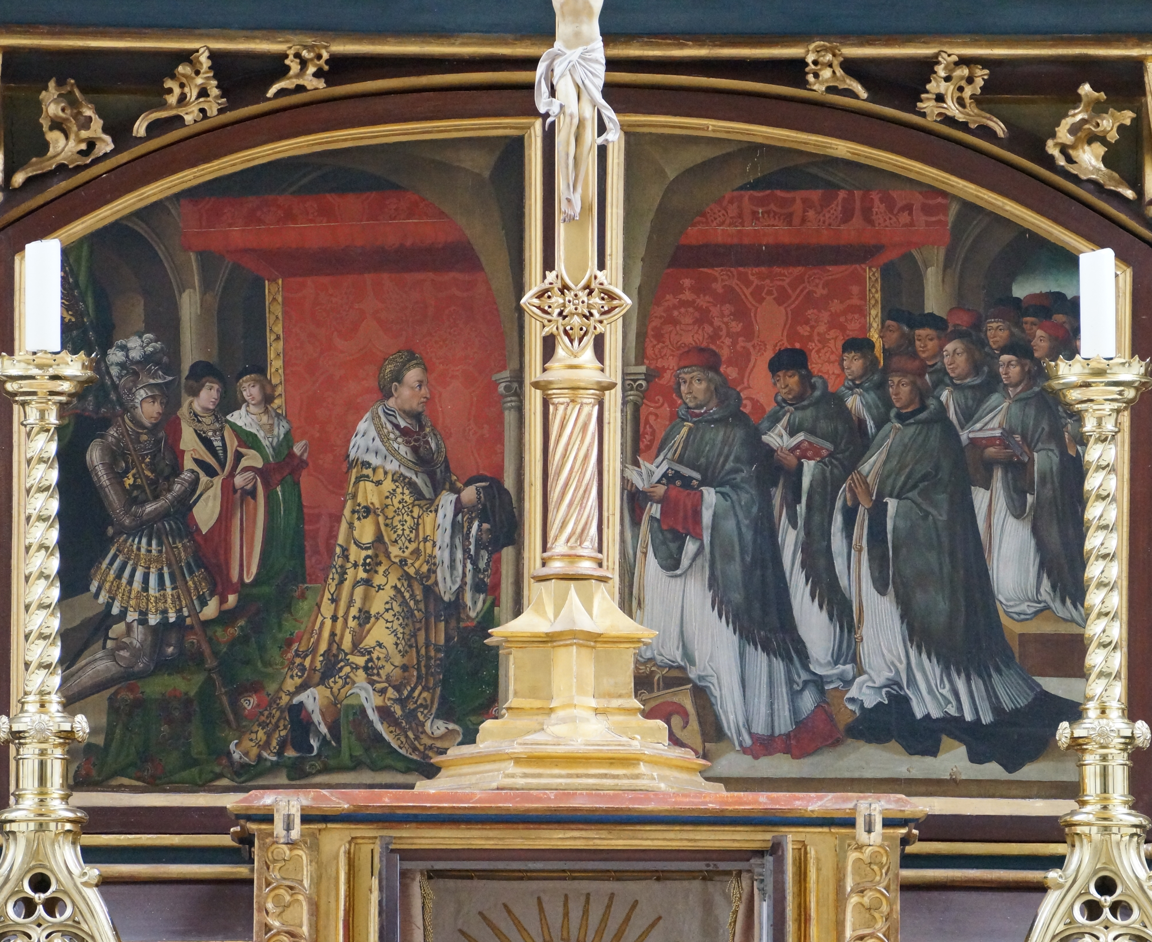 Predella des Leinberger-Altars im Kastulusmünster von Moosburg an der Isar. Die von Hans Wertinger gemalten Bilder zeigen die weltlichen und kirchlichen Stifter des Altars. Links ist Herzog Wolfgang, rechts Probst Theoderich Mair im Vordergrund zu sehen.